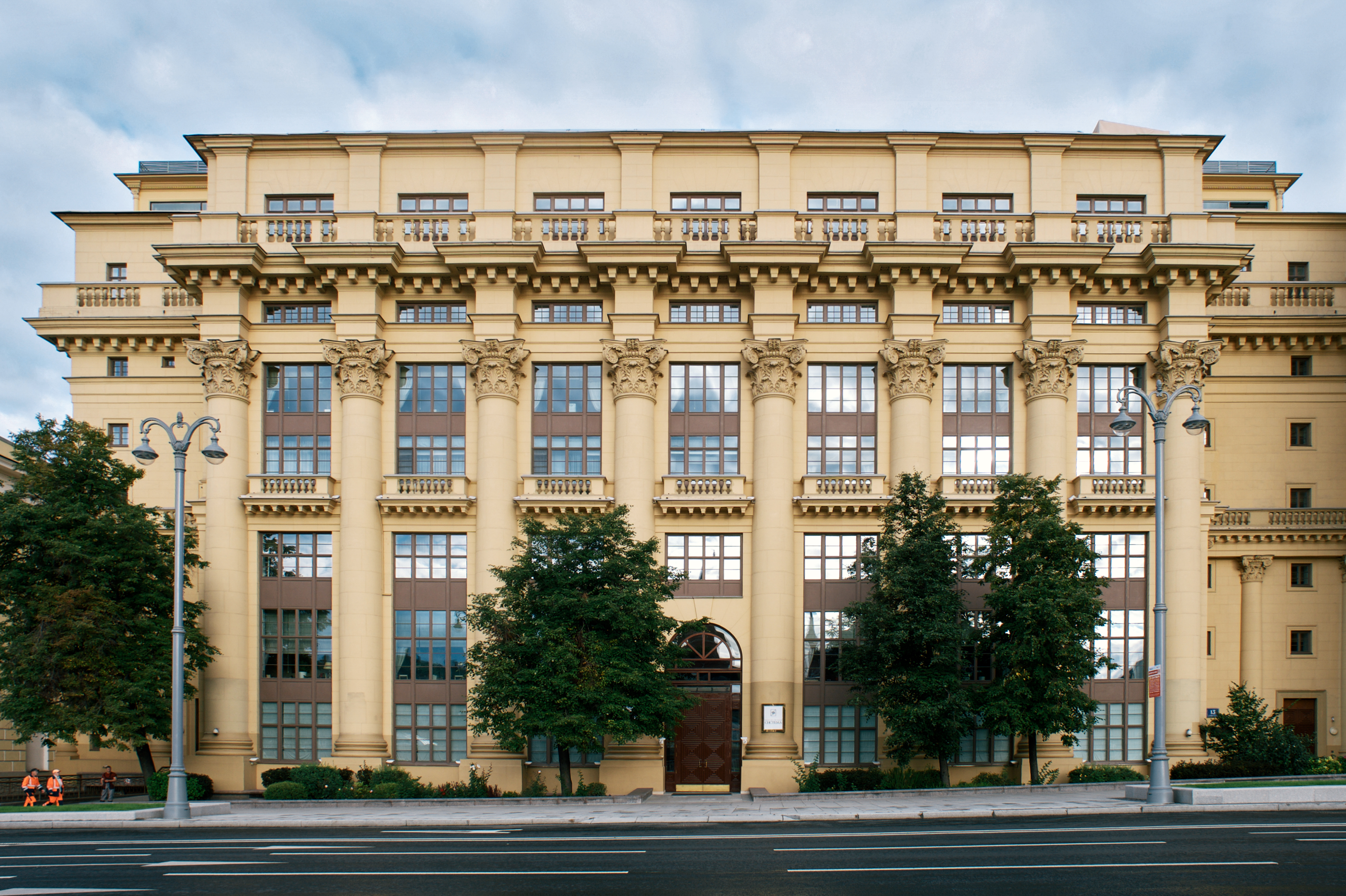 Жилой дом: Моховая ул., дом 13, строение 1, Тверской, Центральный округ, Москва